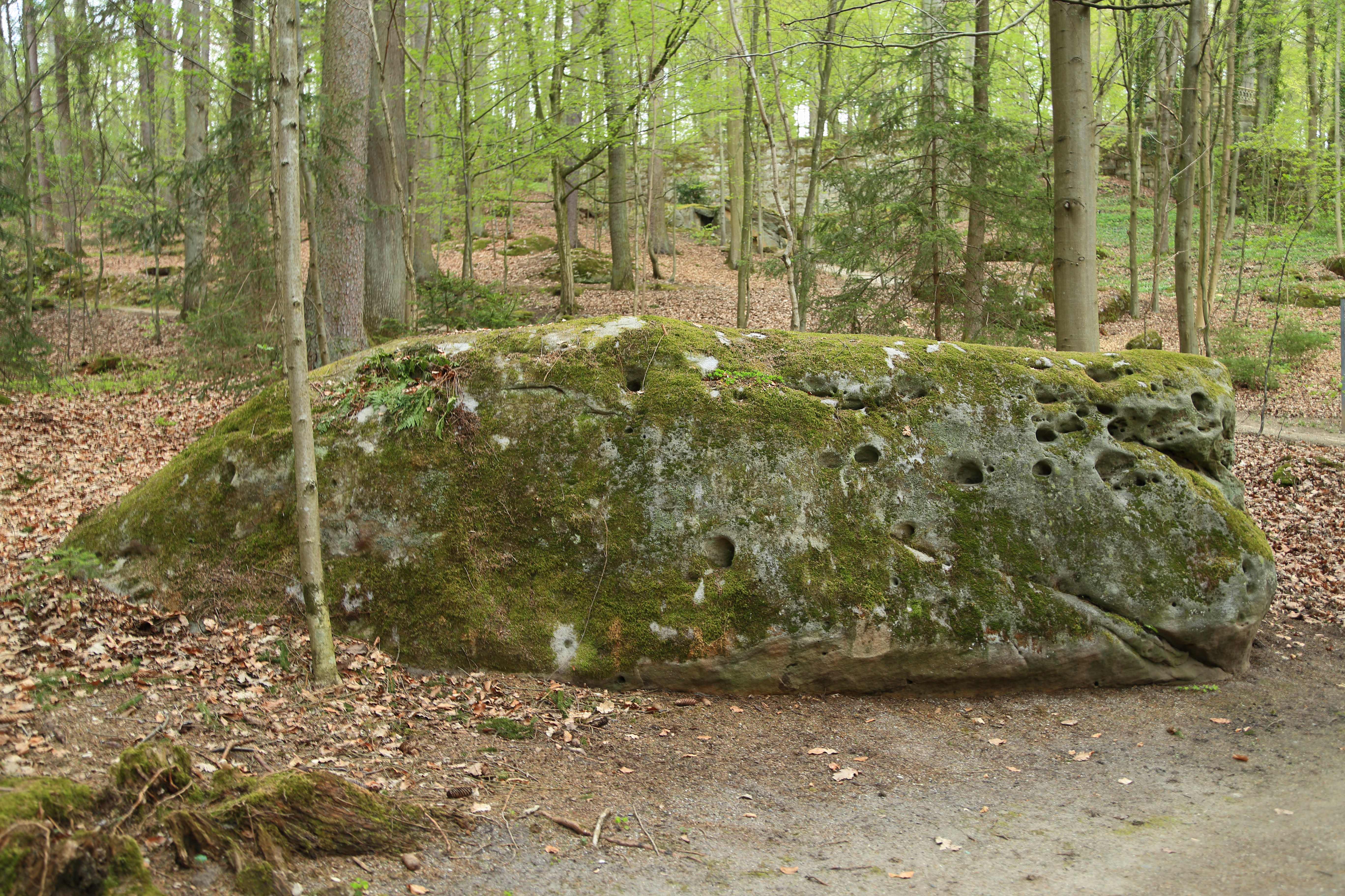 Der Sandsteinblock aus Lias 1 und 2 weist lochartige Verwitterungsspuren im cm-Bereich auf. Tafoni/Wabenverwitterung Felsblock